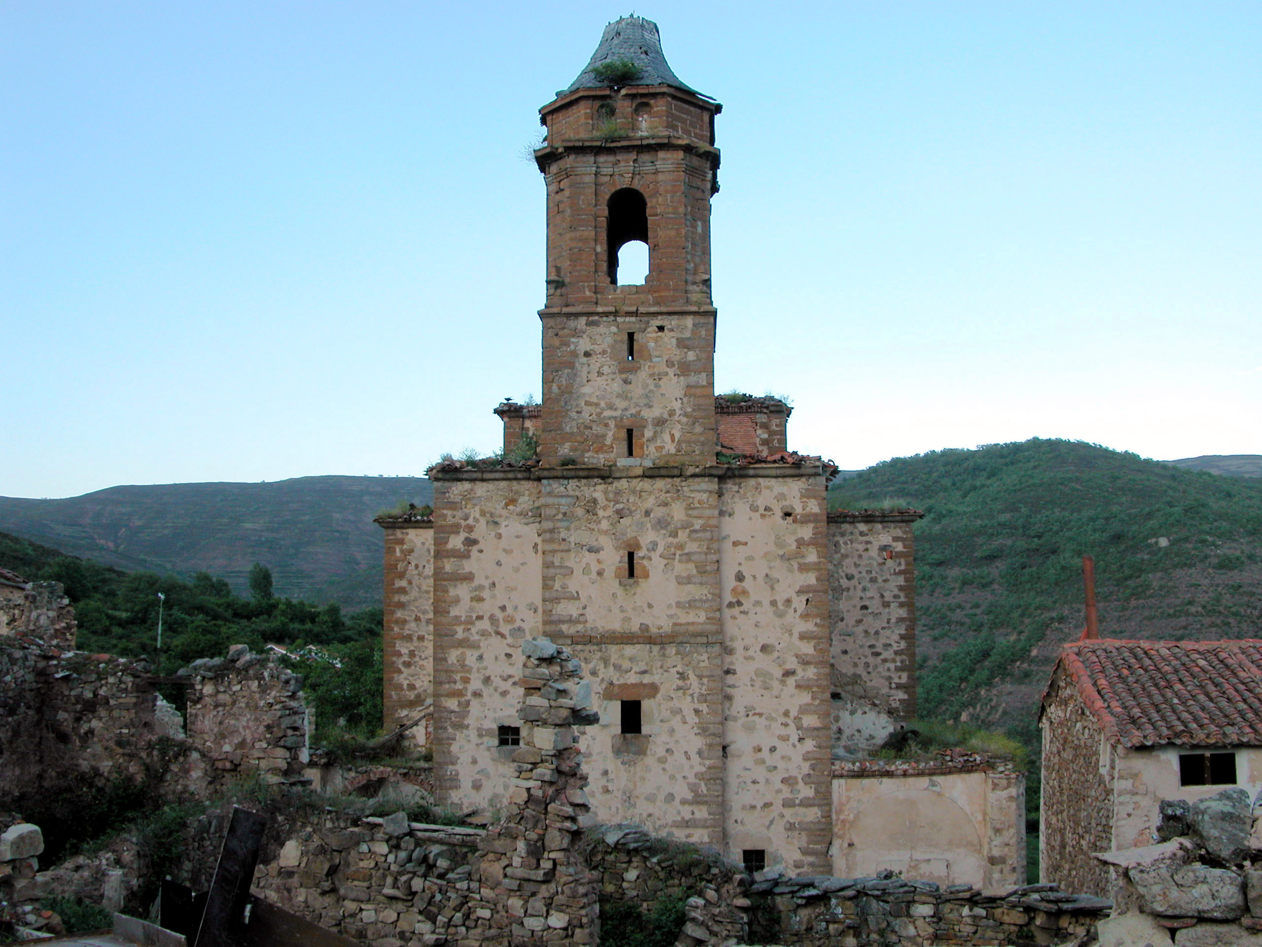 Treguajantes, despoblado de Soto en Cameros (La Rioja - España)